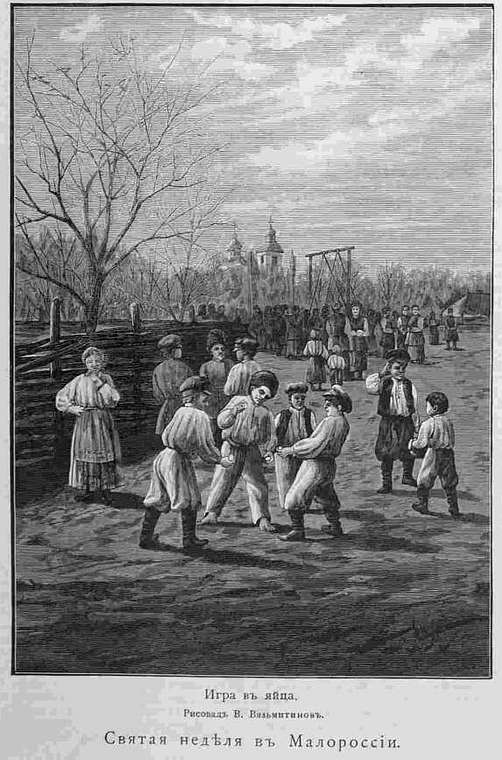 Игра в яйца в Малороссии. "Всемирная иллюстрация", №17, 1888